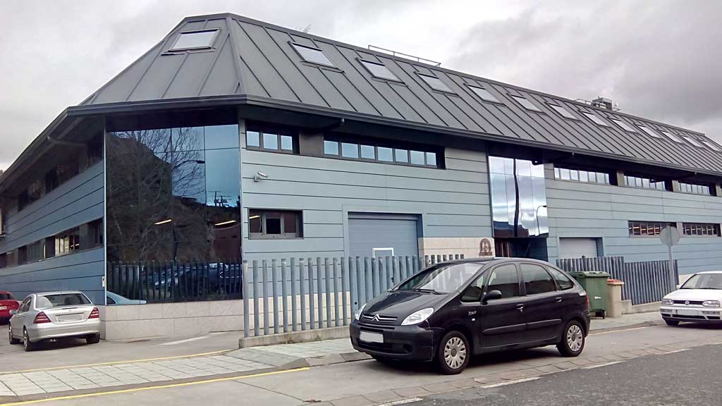 Sede de Osmos en Alvedro.